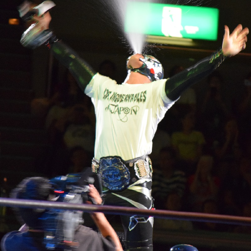 2016年9月25日 ワールド記念ホール「DESTRUCTION in KOBE」 BUSHI